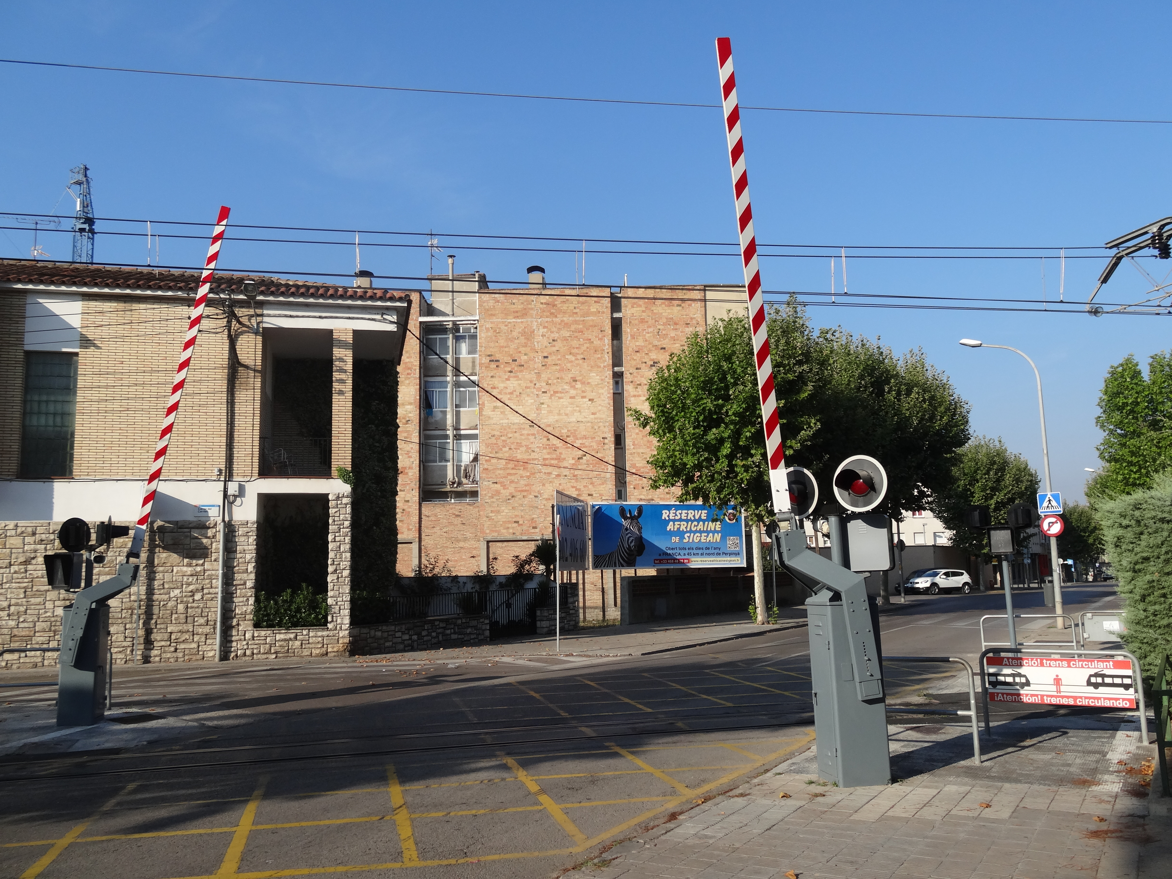 Pas a nivell a l'entrada de l'estació de tren d'Igualada